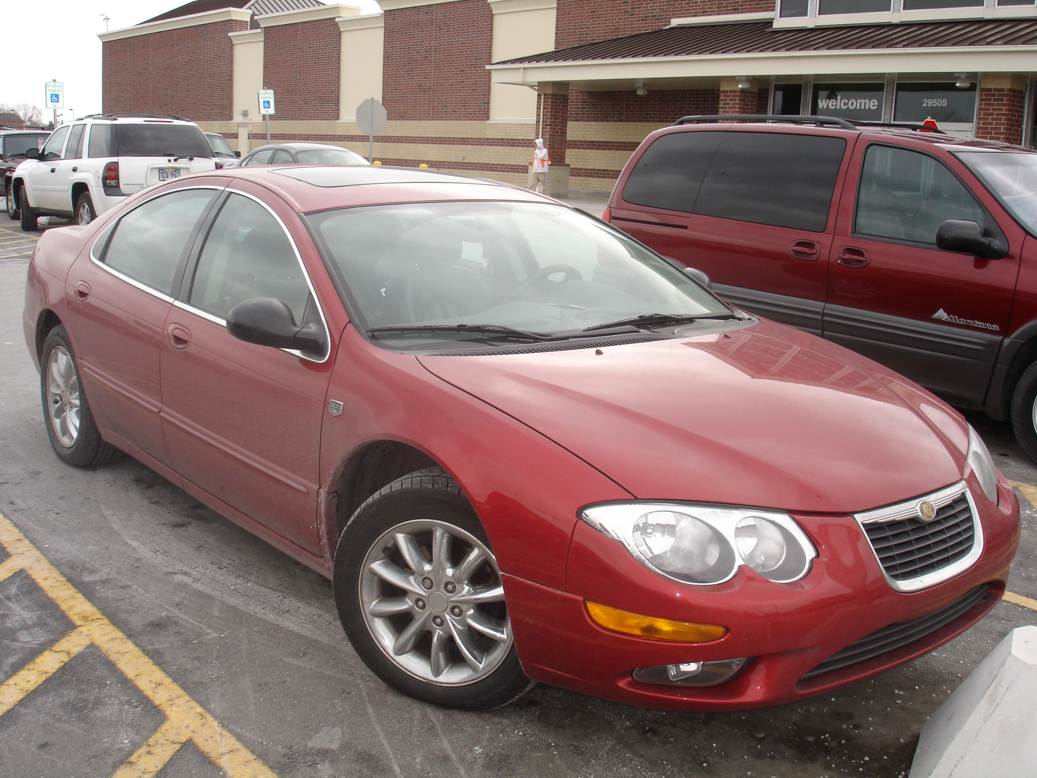 2002 Chrysler 300M